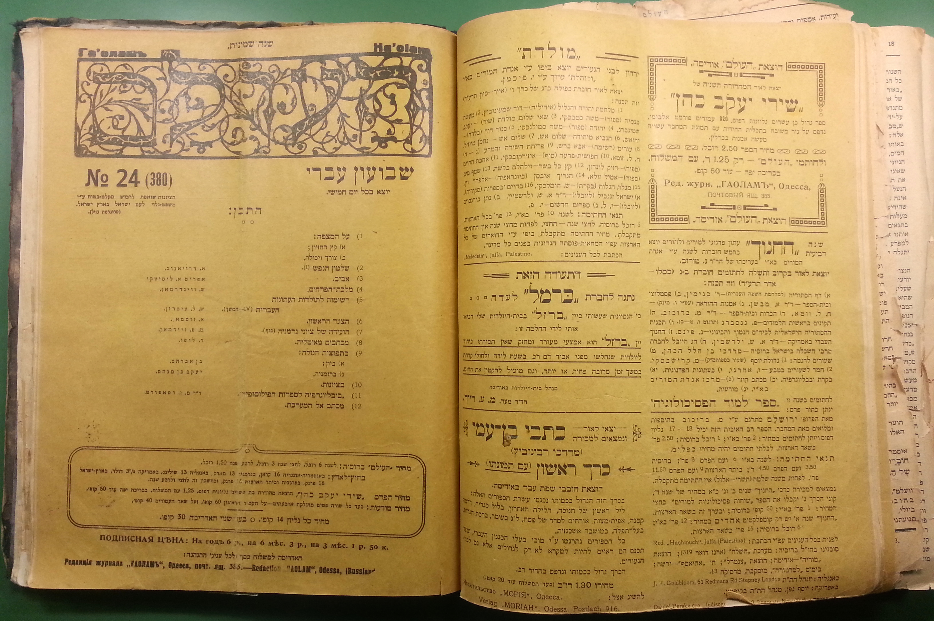 שער העיתון הציוני "העולם" 1914